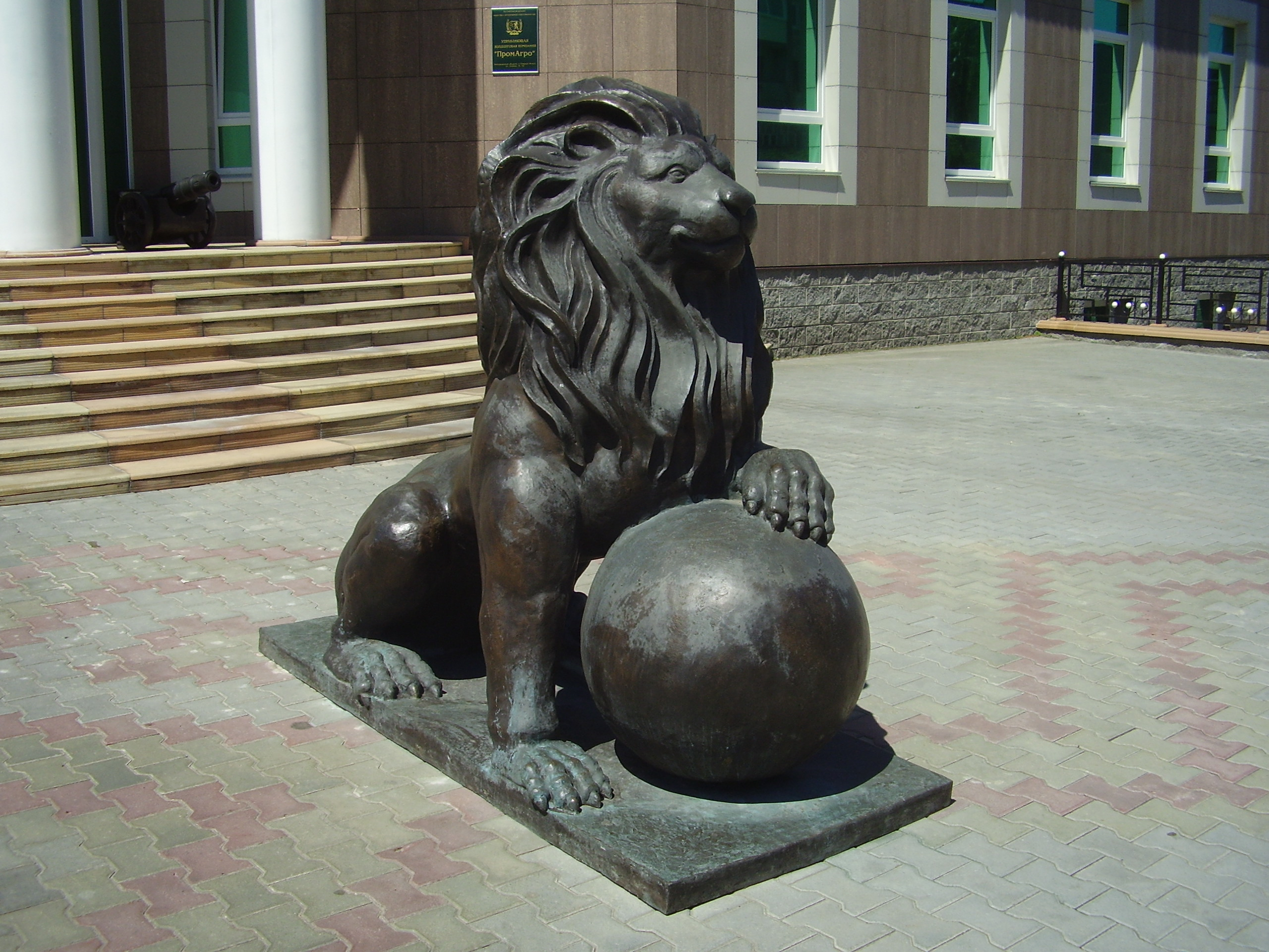 Старый Оскол. Статуя льва у здания ПромАгро